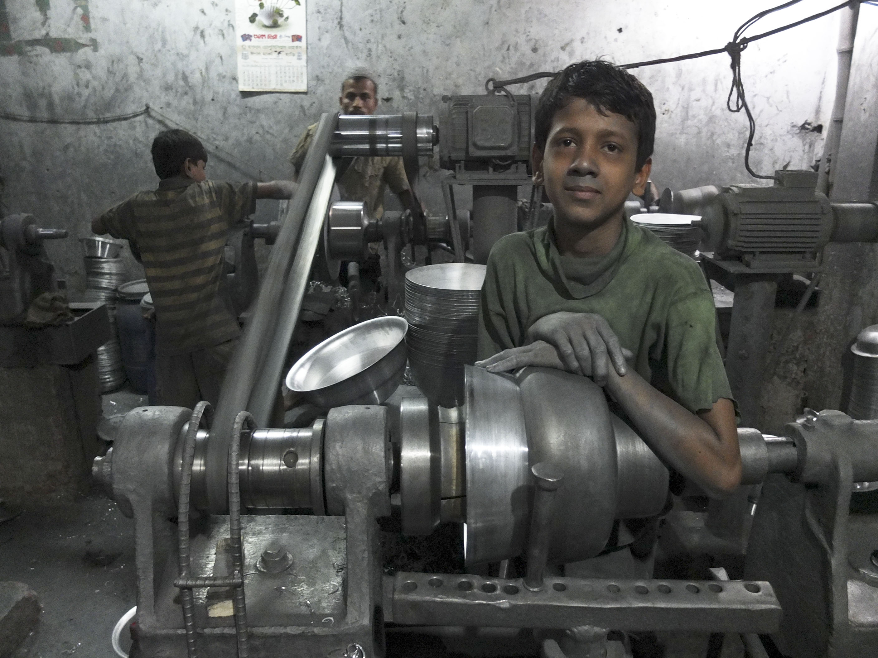 Pobreza y trabajo infantil Dacca, Bangladesh.